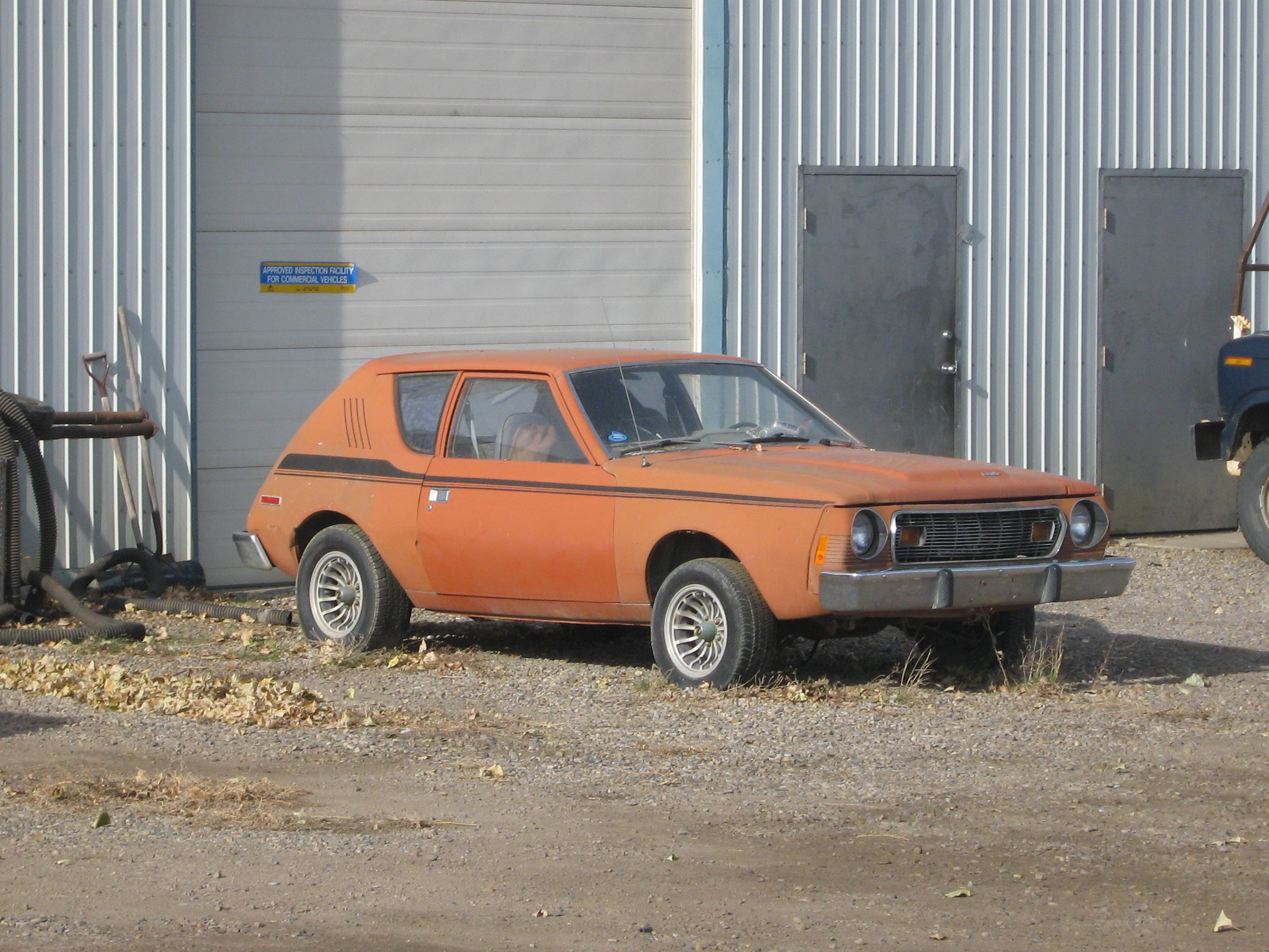 AMC GremlinAMC Gremlin